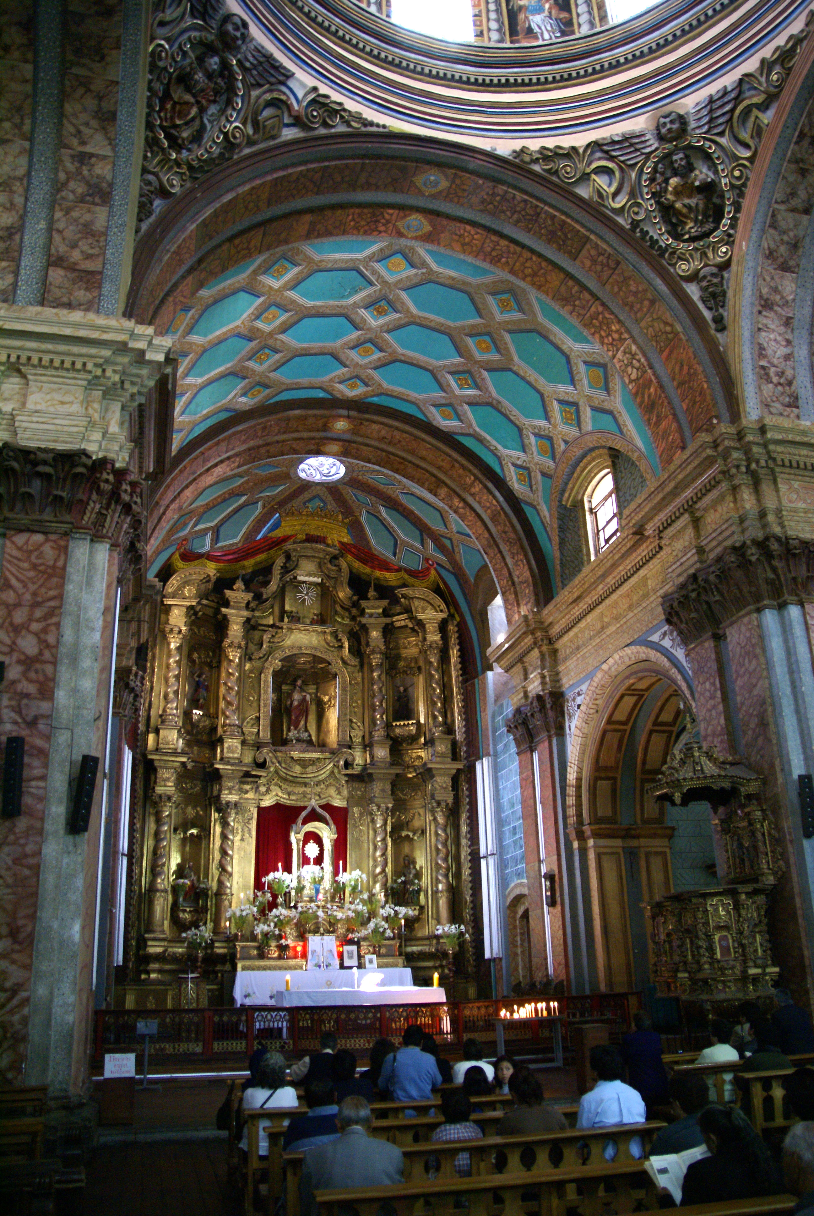 Quito cathedral Ecuado